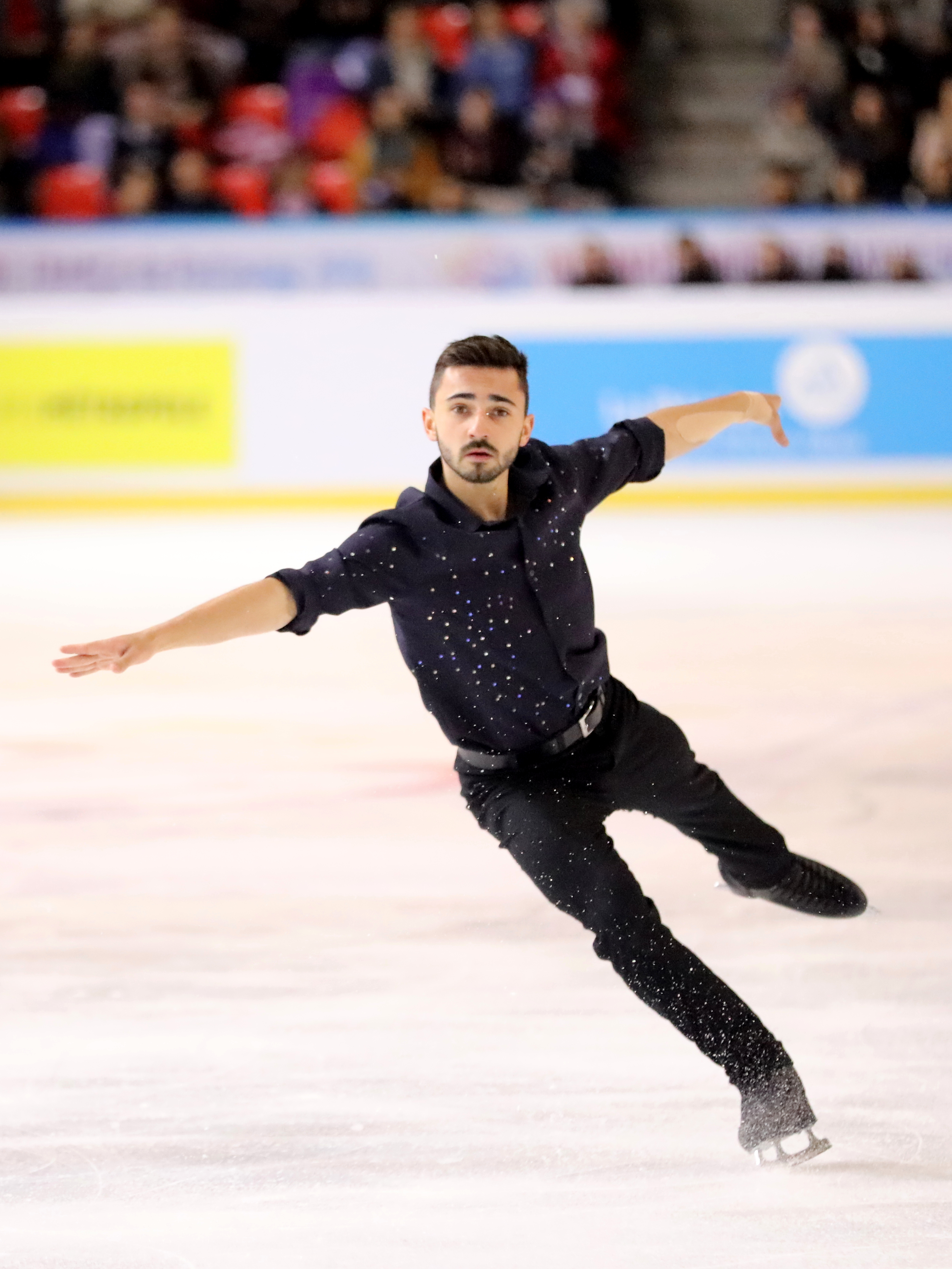 Programme libre de Kévin Aymoz aux Internationaux de France de patinage 2019.